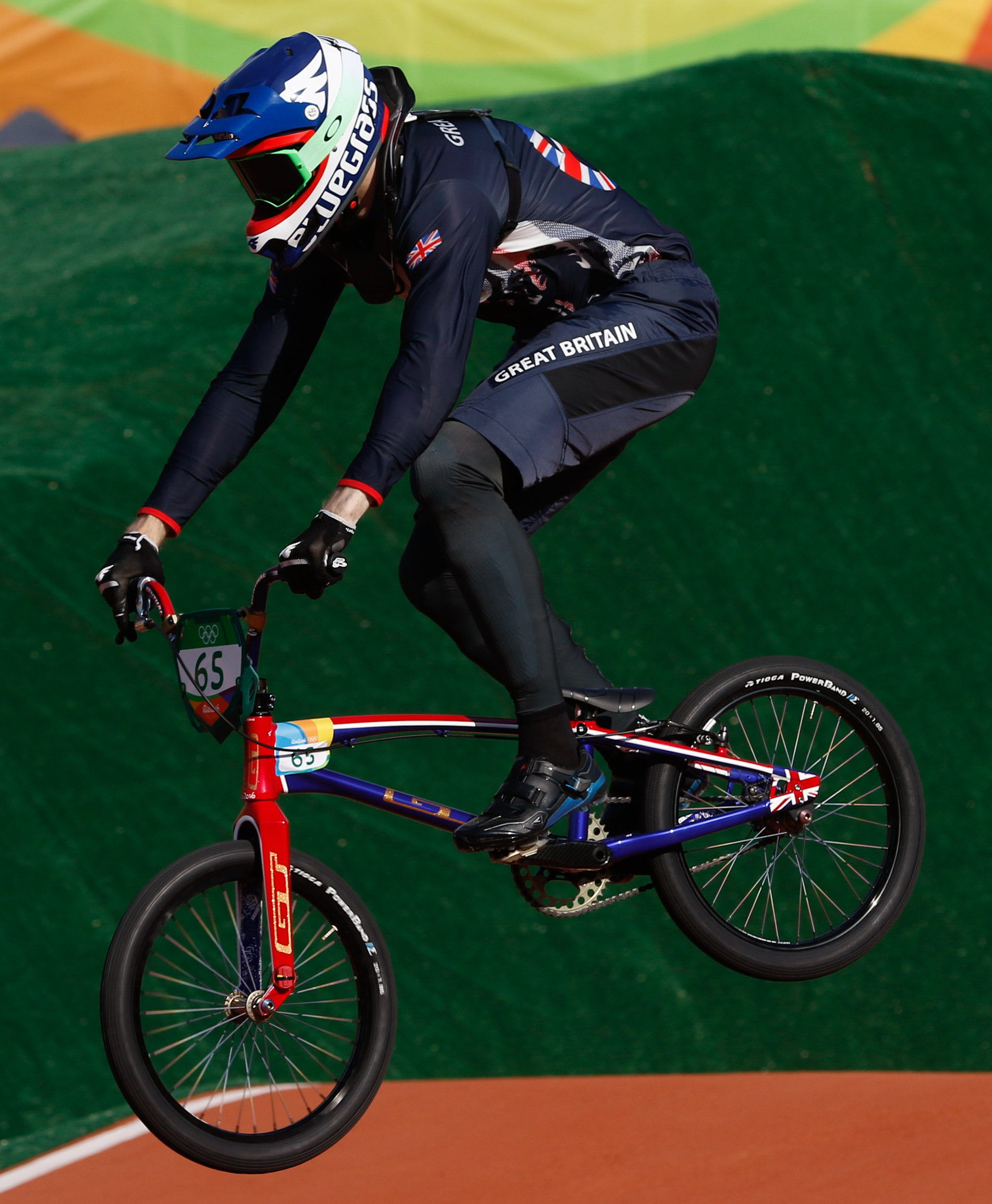 Rio de Janeiro - Ciclista britânico Liam Phillips compete BMX nos Jogos Olímpicos Rio 2016, no Parque Radical em Deodoro ( Fernando Frazão/Agência Brasil)